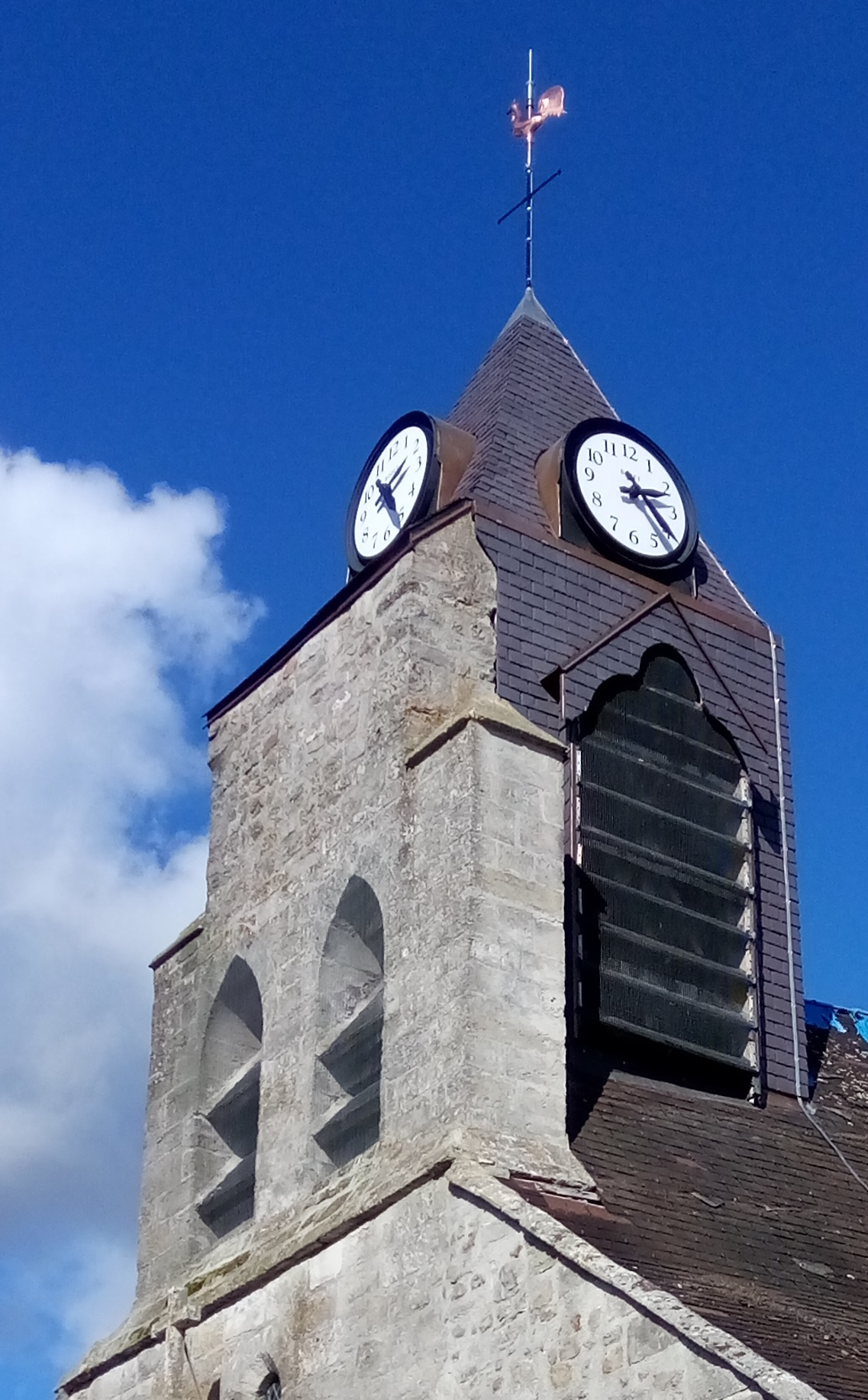 Notre nouveau clocher après réfection. Celui-ci avait été endommagé par la foudre le 17 juin 2016.